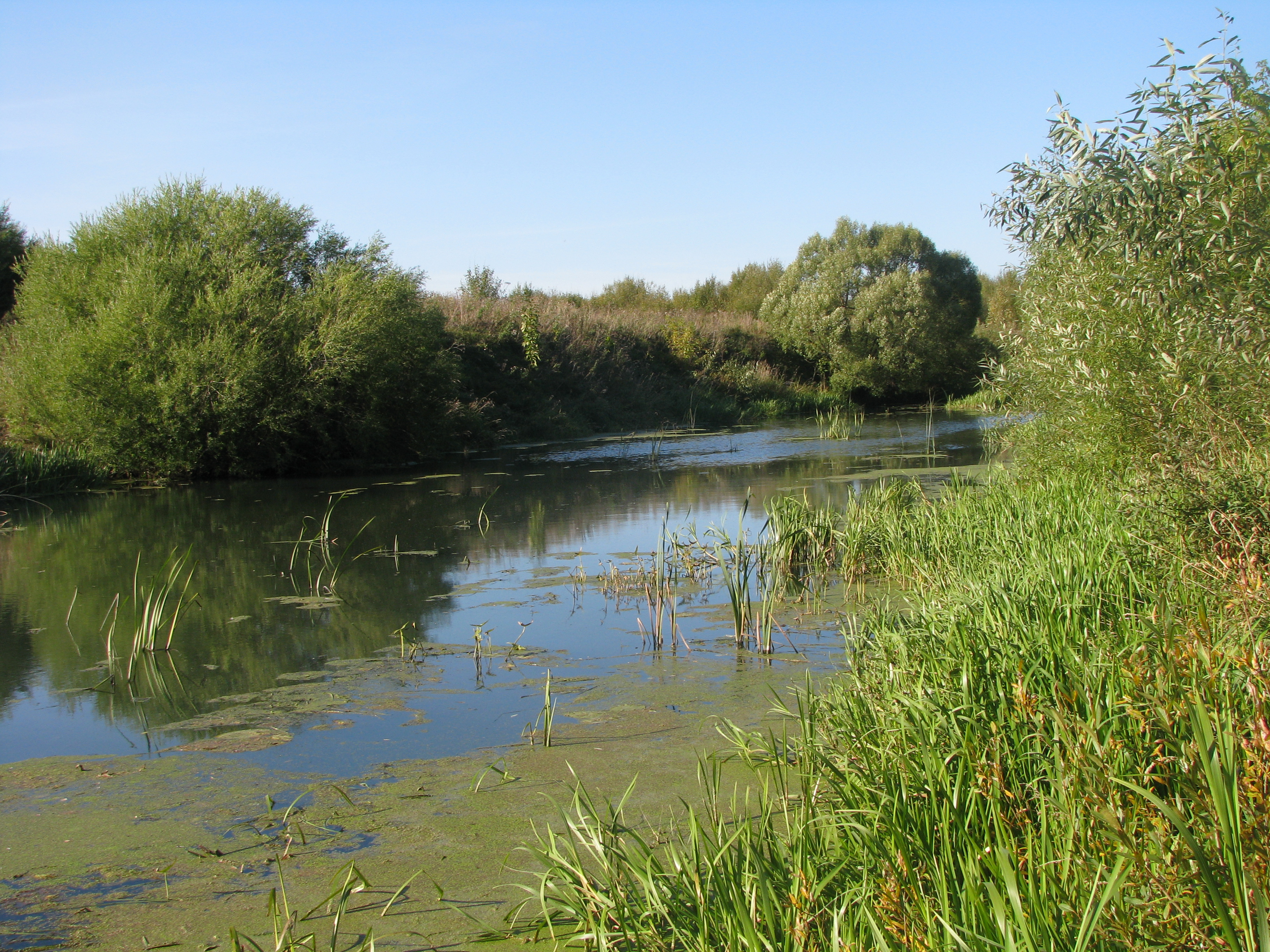 Река Ирмес в Гаврилове Посаде